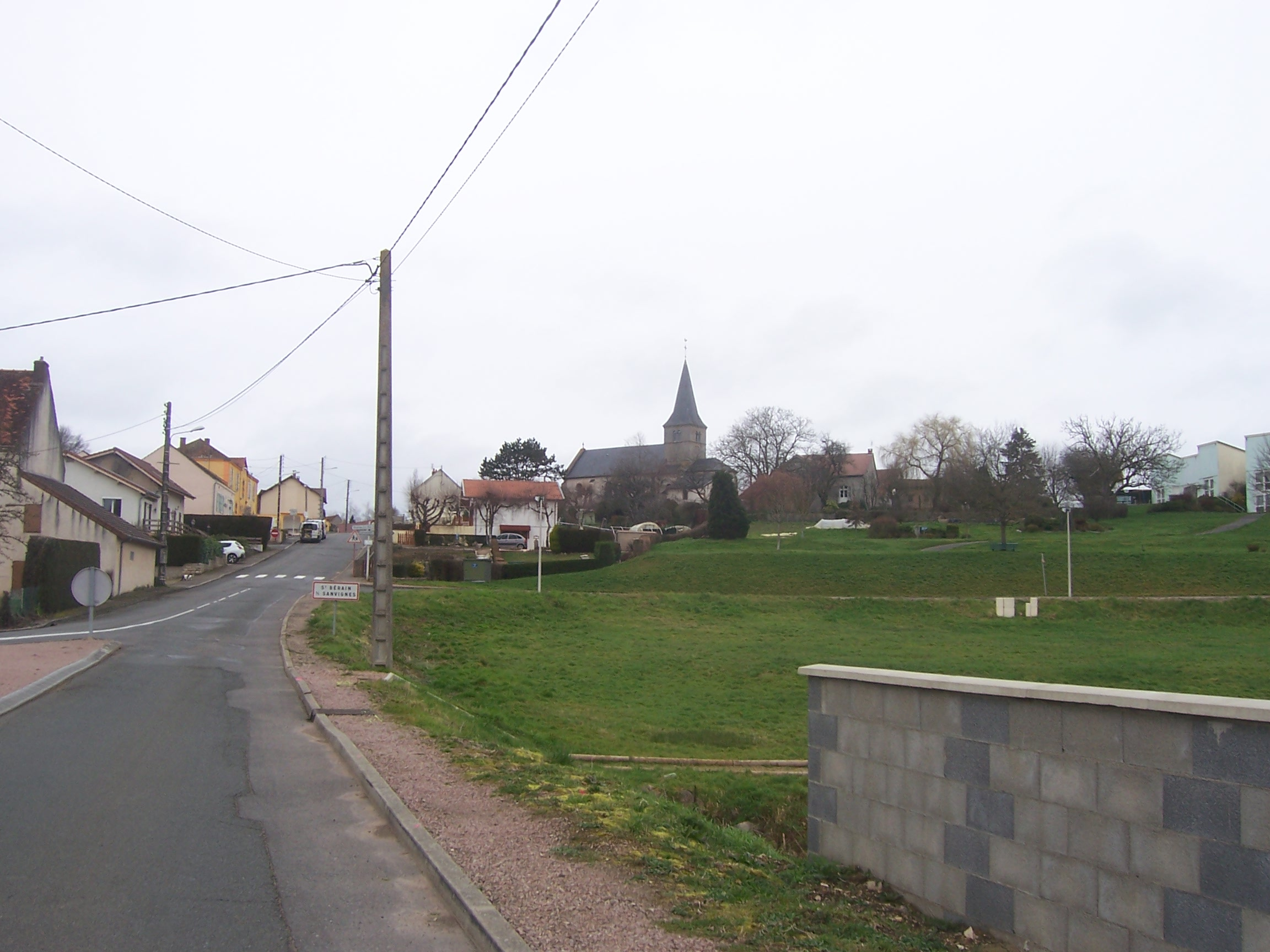 Saint-Berain-sous-Sanvigne